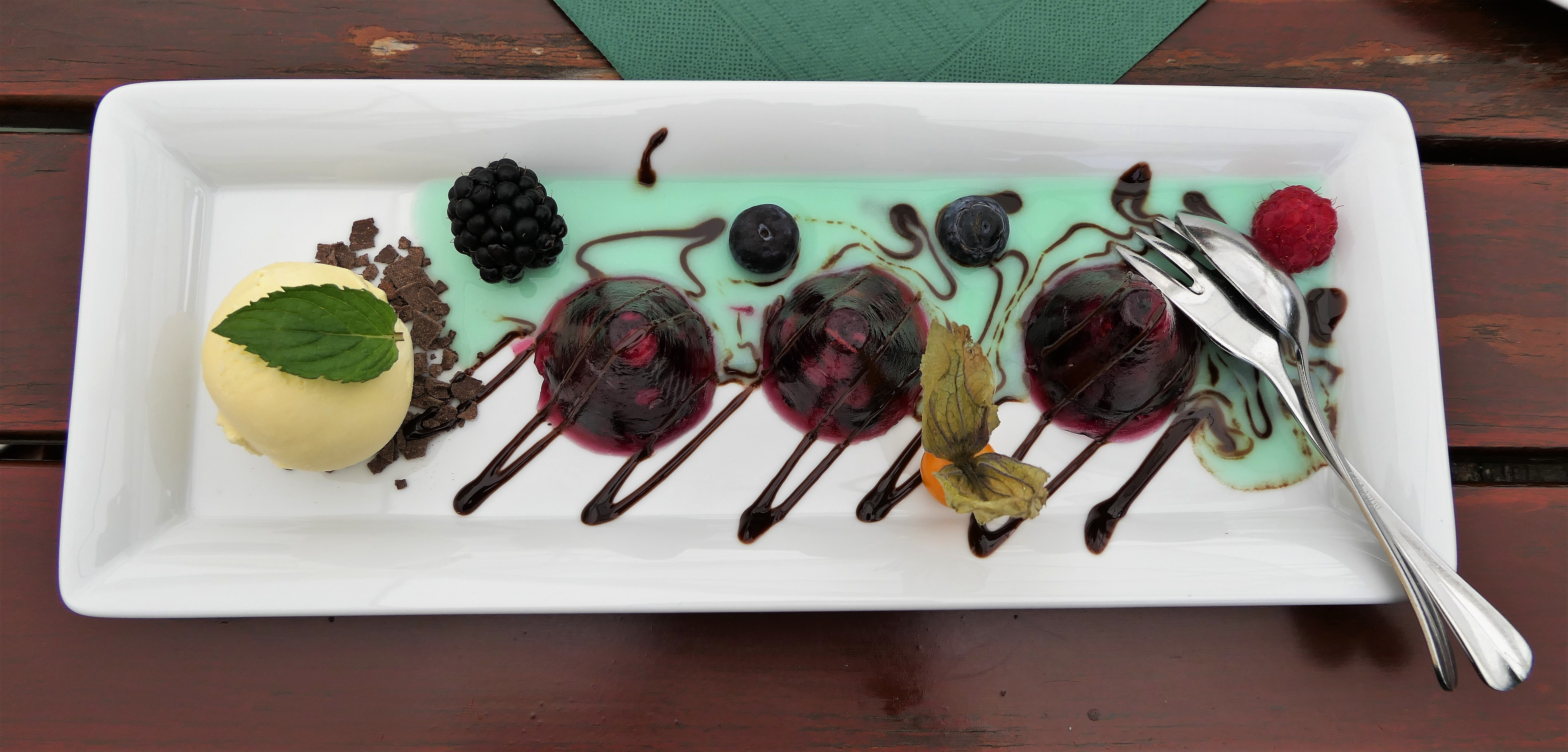 Waldbeeren in Weingelee an einer Waldmeistersoße mit Vanilleeis (Waldschänke in Moritzburg)